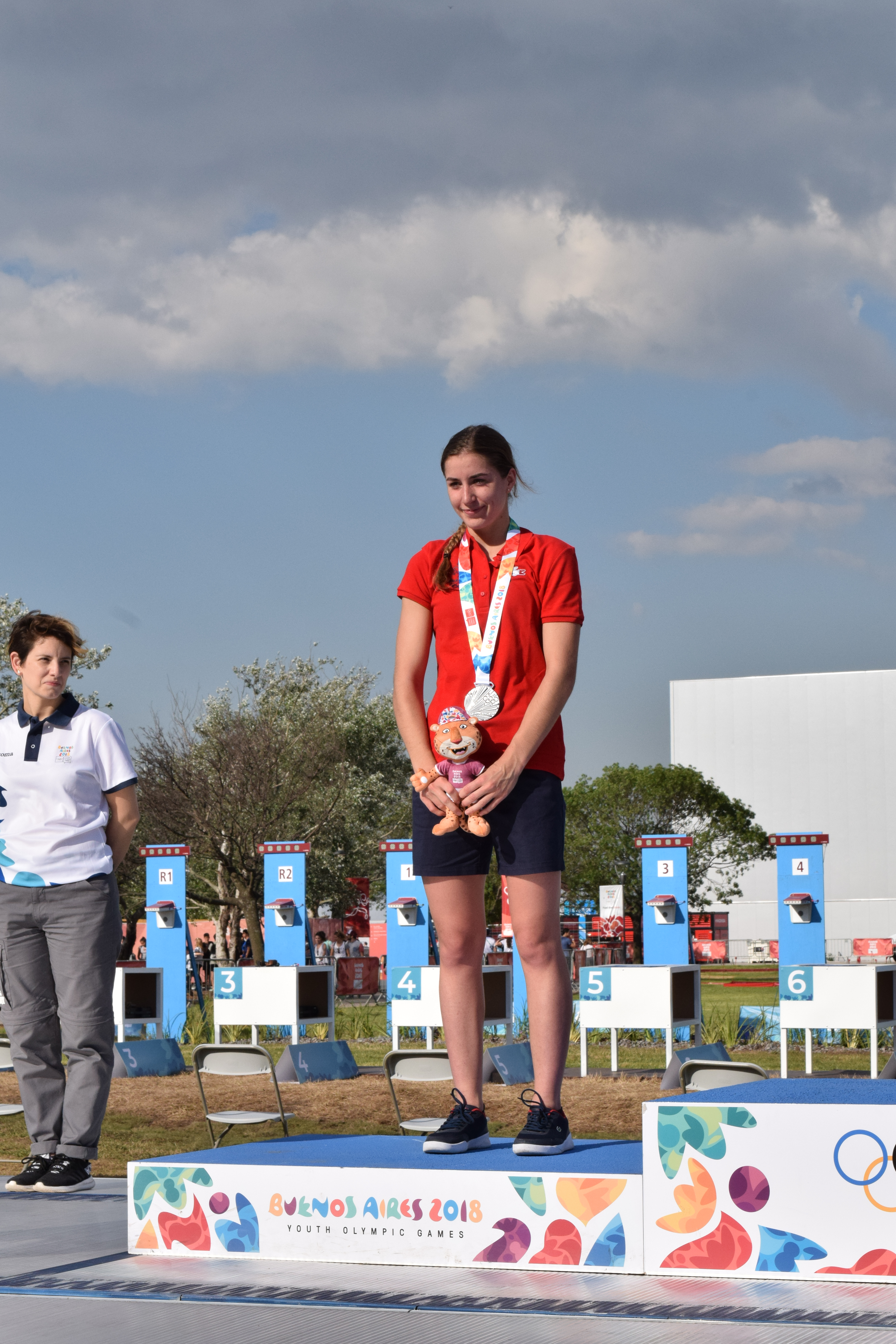 Finales de Pentlatón Moderno , durante los Juegos Olímpicos de la Juventud 2018 en Buenos Aires. Tarde del 13 de octubre. Emma RIFF.